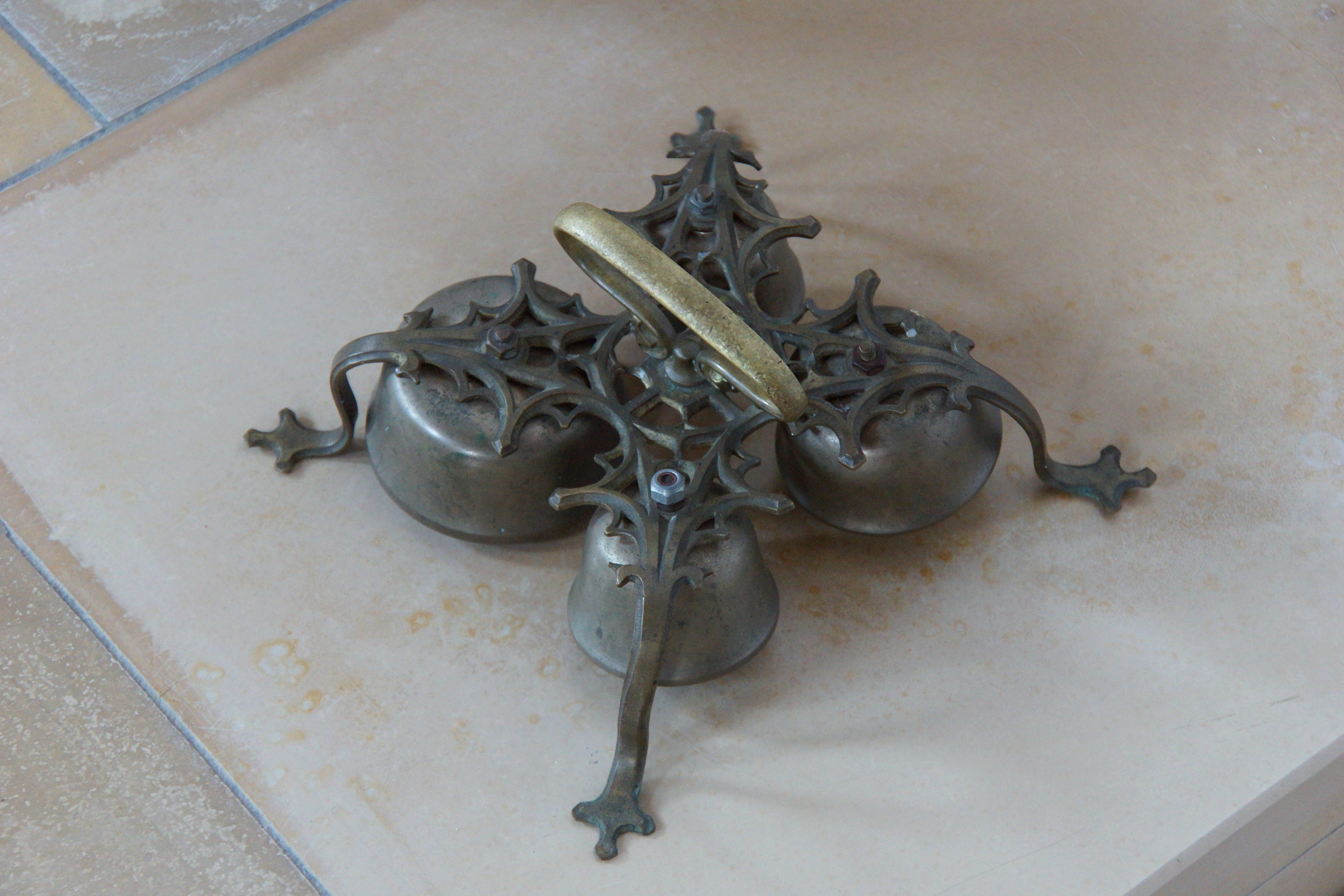 Die katholische Expositurkirche Heilig Kreuz in Gebertshofen, Markt Lauterhofen